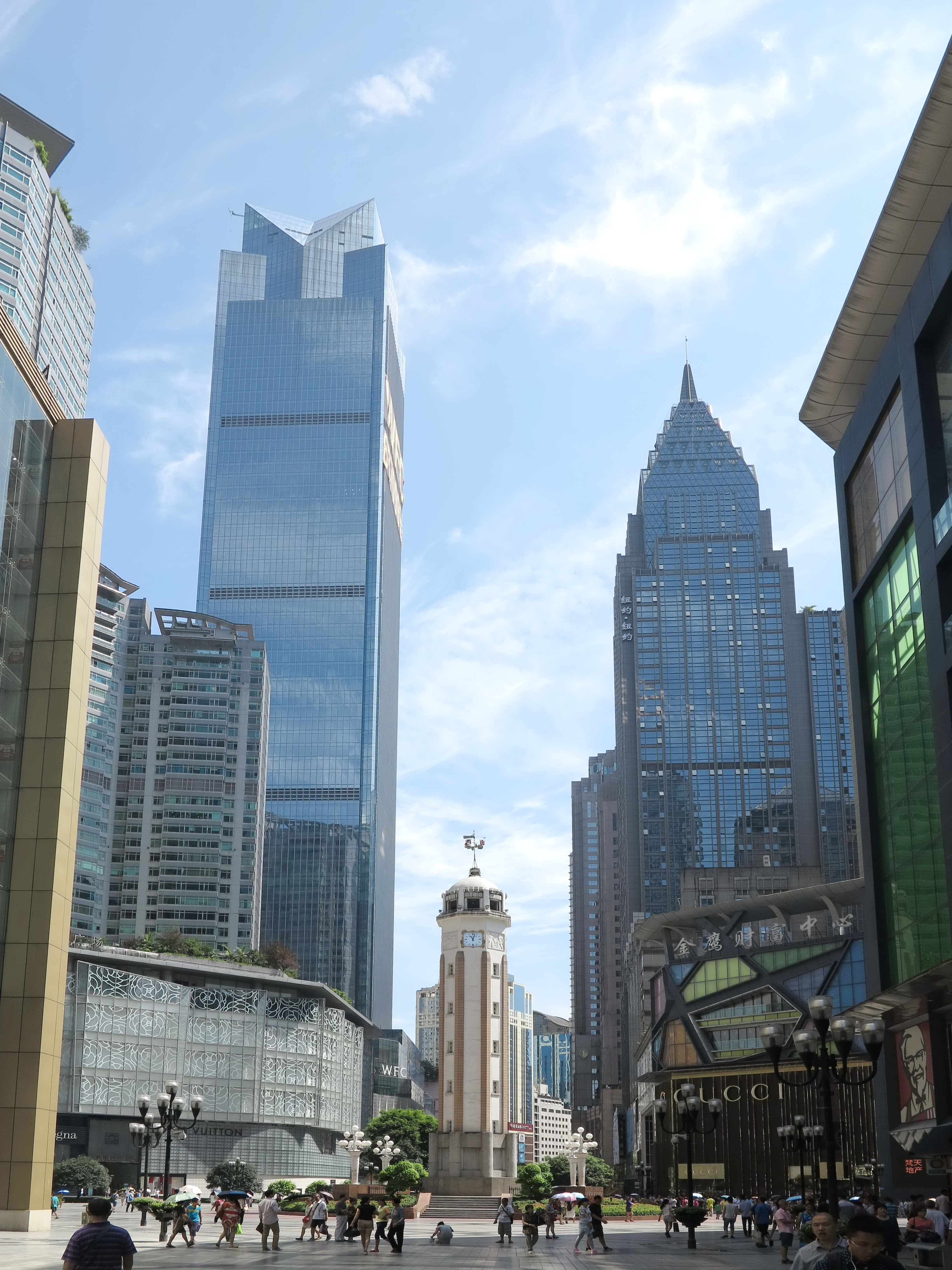 重庆的蓝天- 最美解放碑